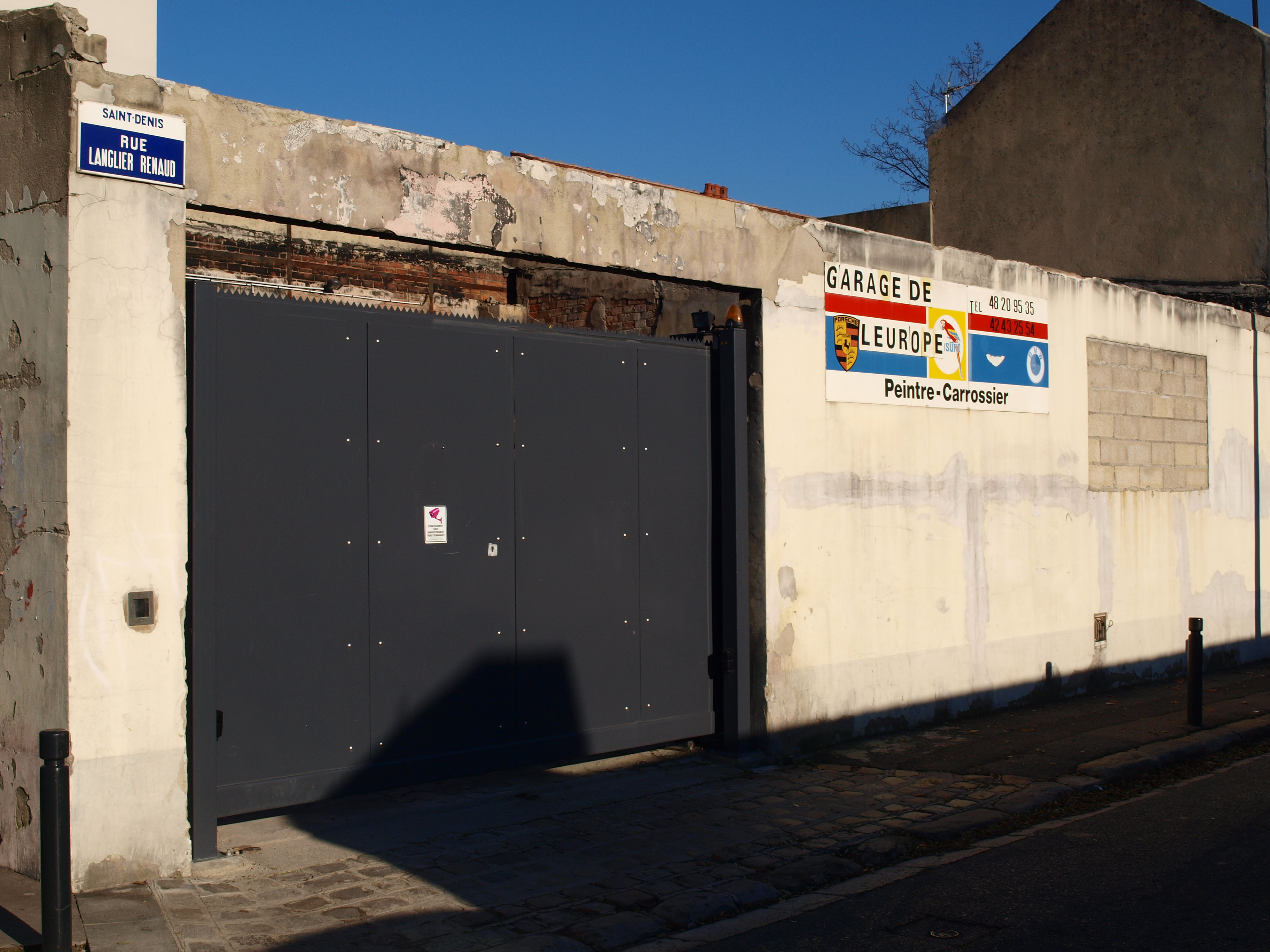 Saint-Denis (Seine-Saint-Denis, France) ; garage